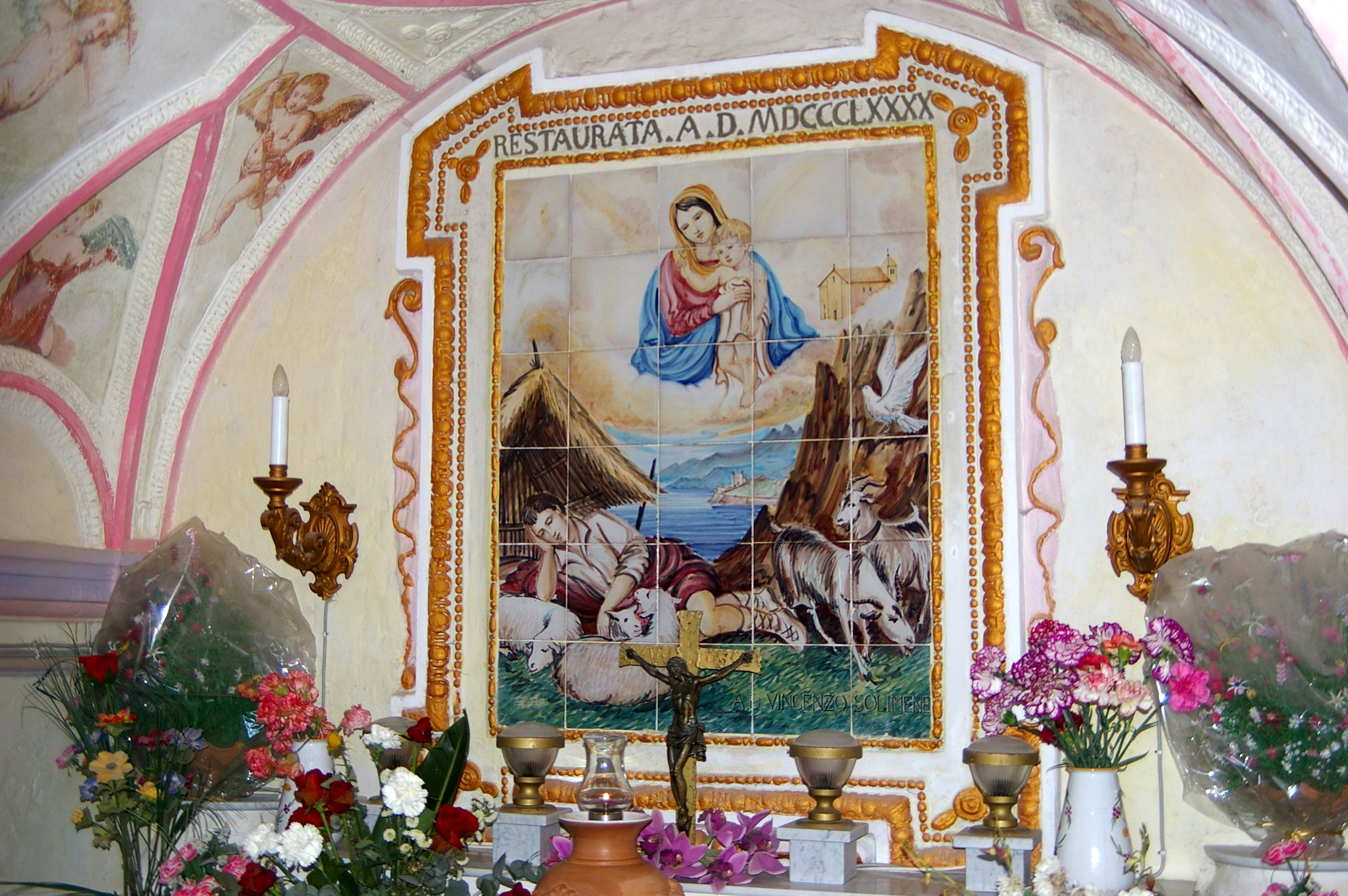 Santuario di Maria Santissima Avvocata sopra Maiori, Campania, Italia. La grotta. Eumolpa, opera propria.